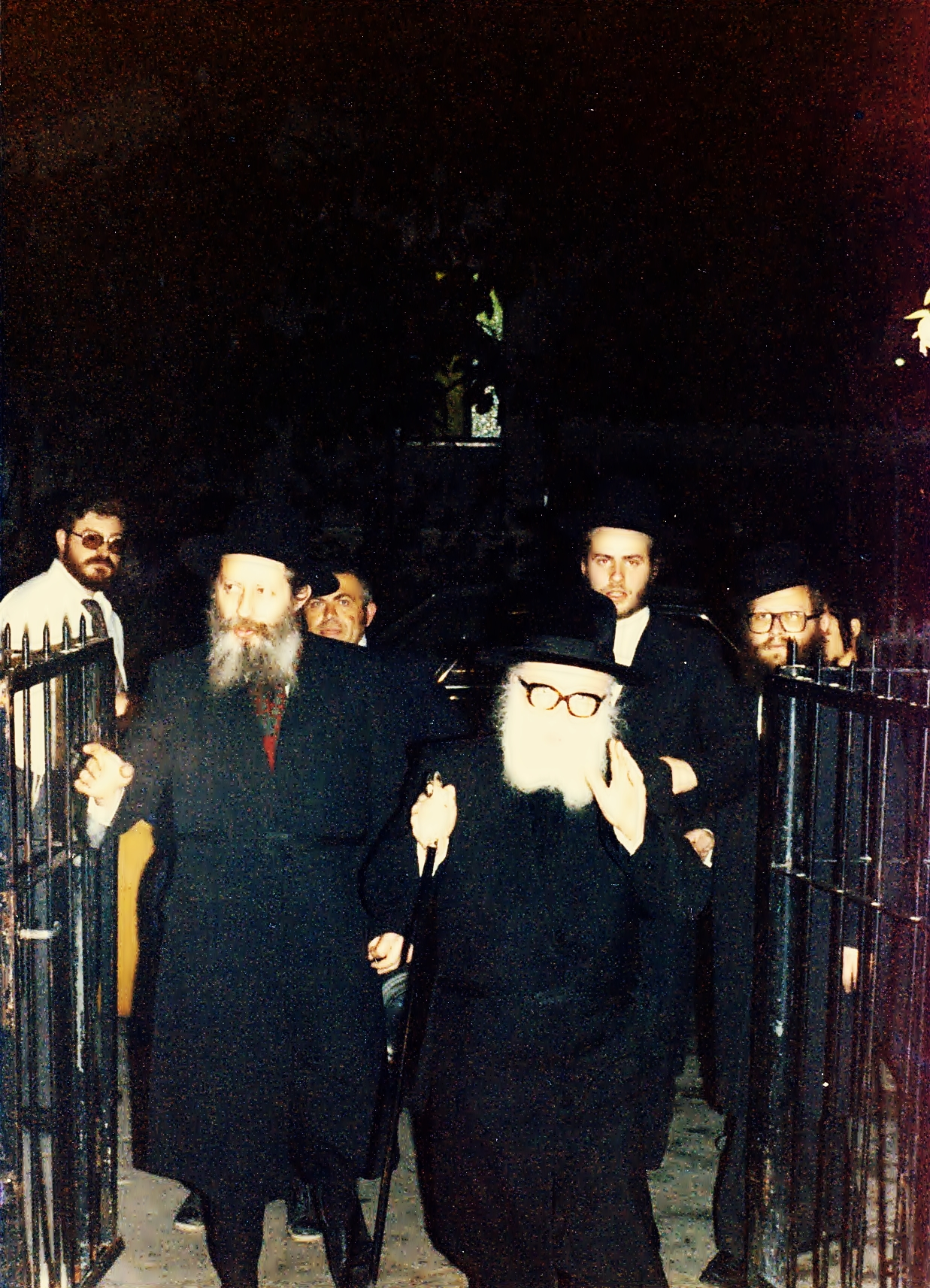 האדמו"ר הלב שמחה מגור עם בנו האדמו"ר שליט"א